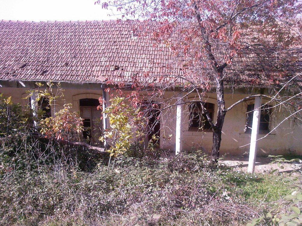 école primaire Ait Ikhlef (1898 - 1989)